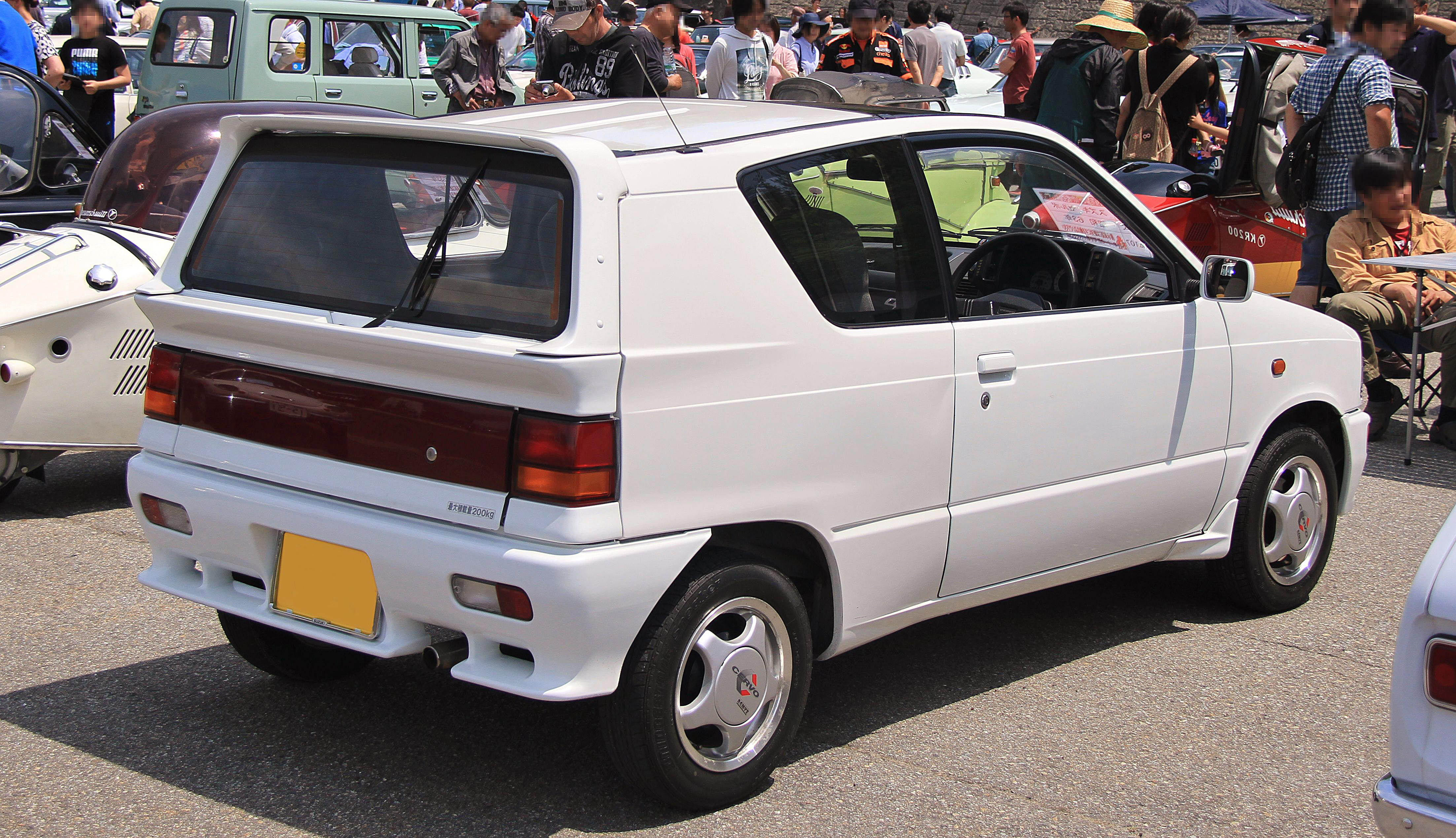 Suzuki Cervo